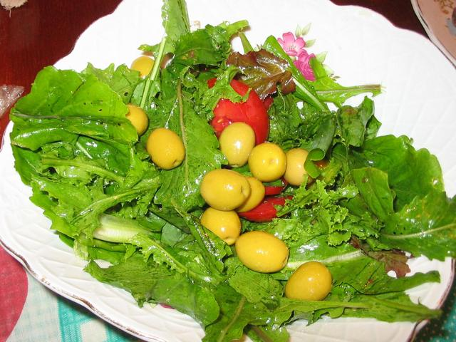 Овочевий салат: страва з листя салату та руколи, оливок, помідор, заправлена соком цитрини та олією